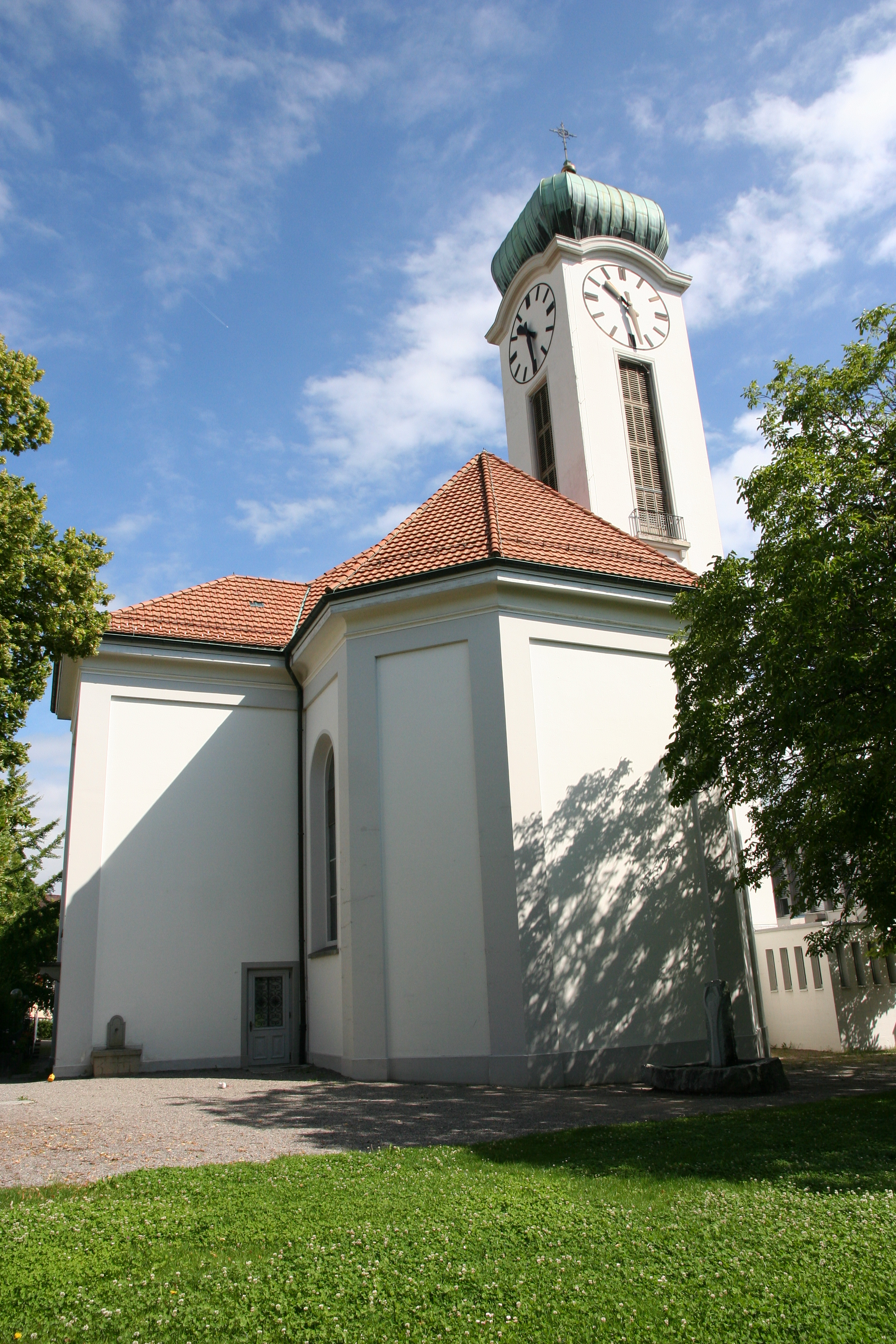 Römisch-katholische Pfarrkirche St. Felix und Regula Thalwil, Ansicht von Süden